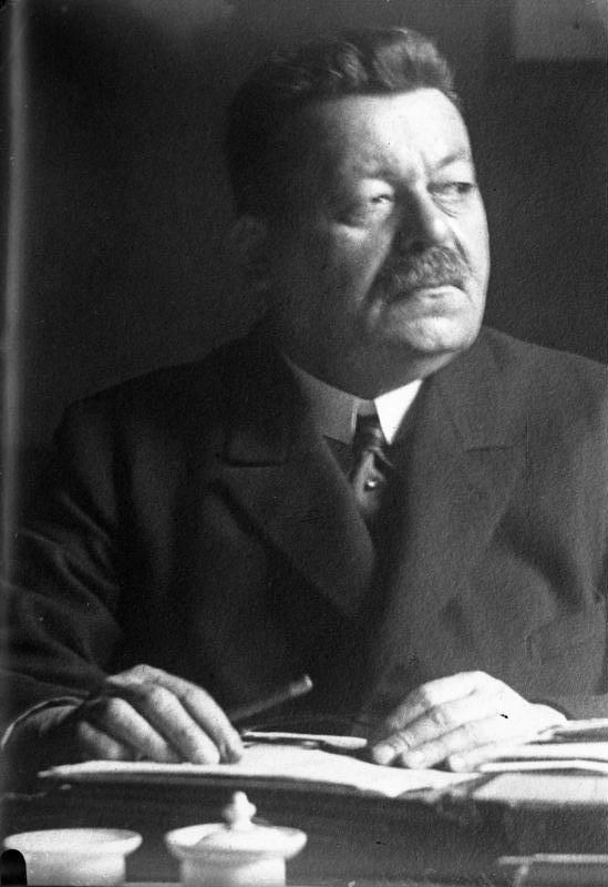 Reichspräsident Ebert tot! Letzte Aufnahme des Reichspräsidenten Ebert, photographiert am 15. Februar 25, vor 14 Tagen an seinem Schreibtisch.